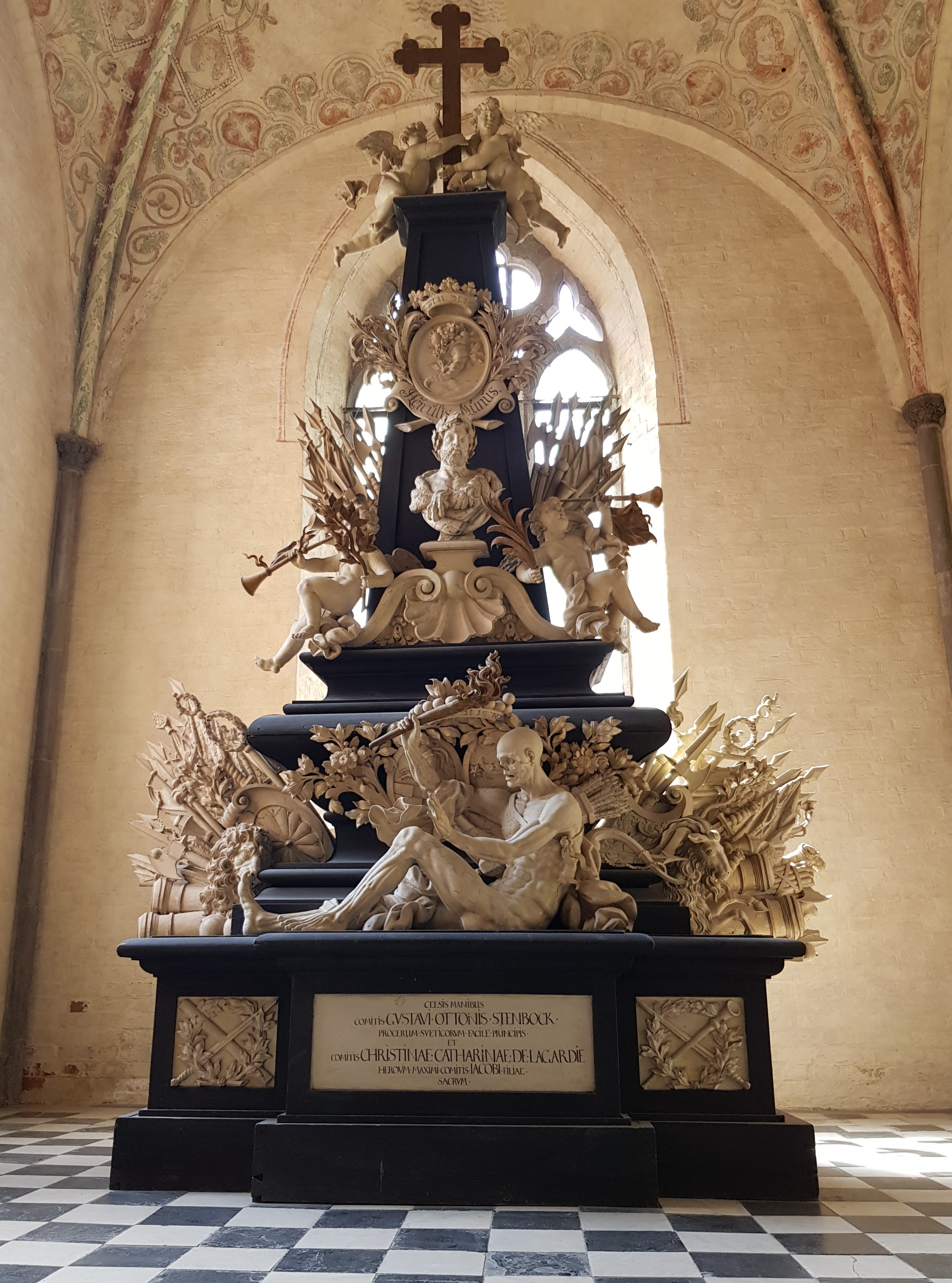 Gustaf Otto Stenbocks gravmonument i Strängnäs domkyrka.